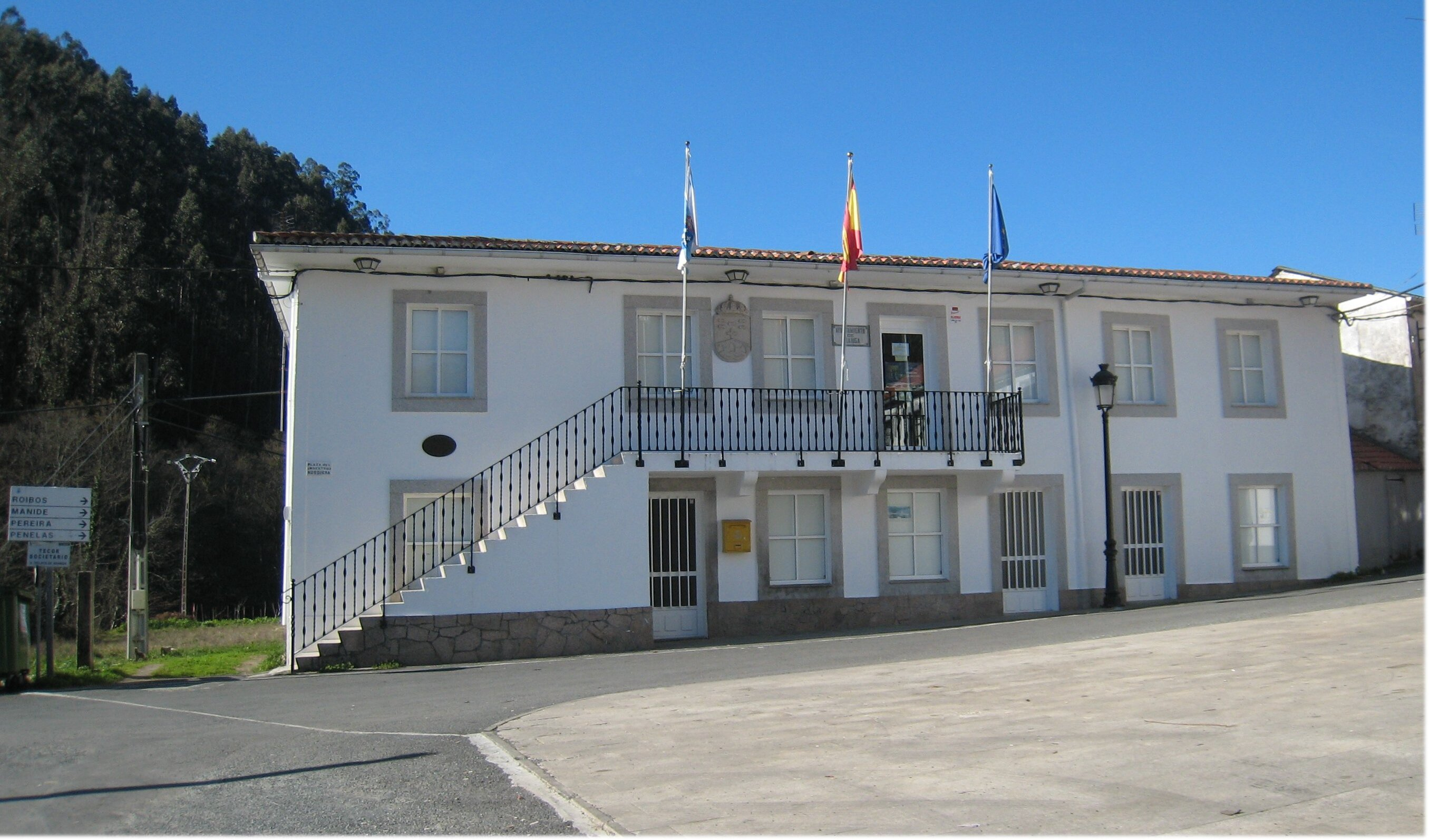 Casa do Concello do concello de Aranga